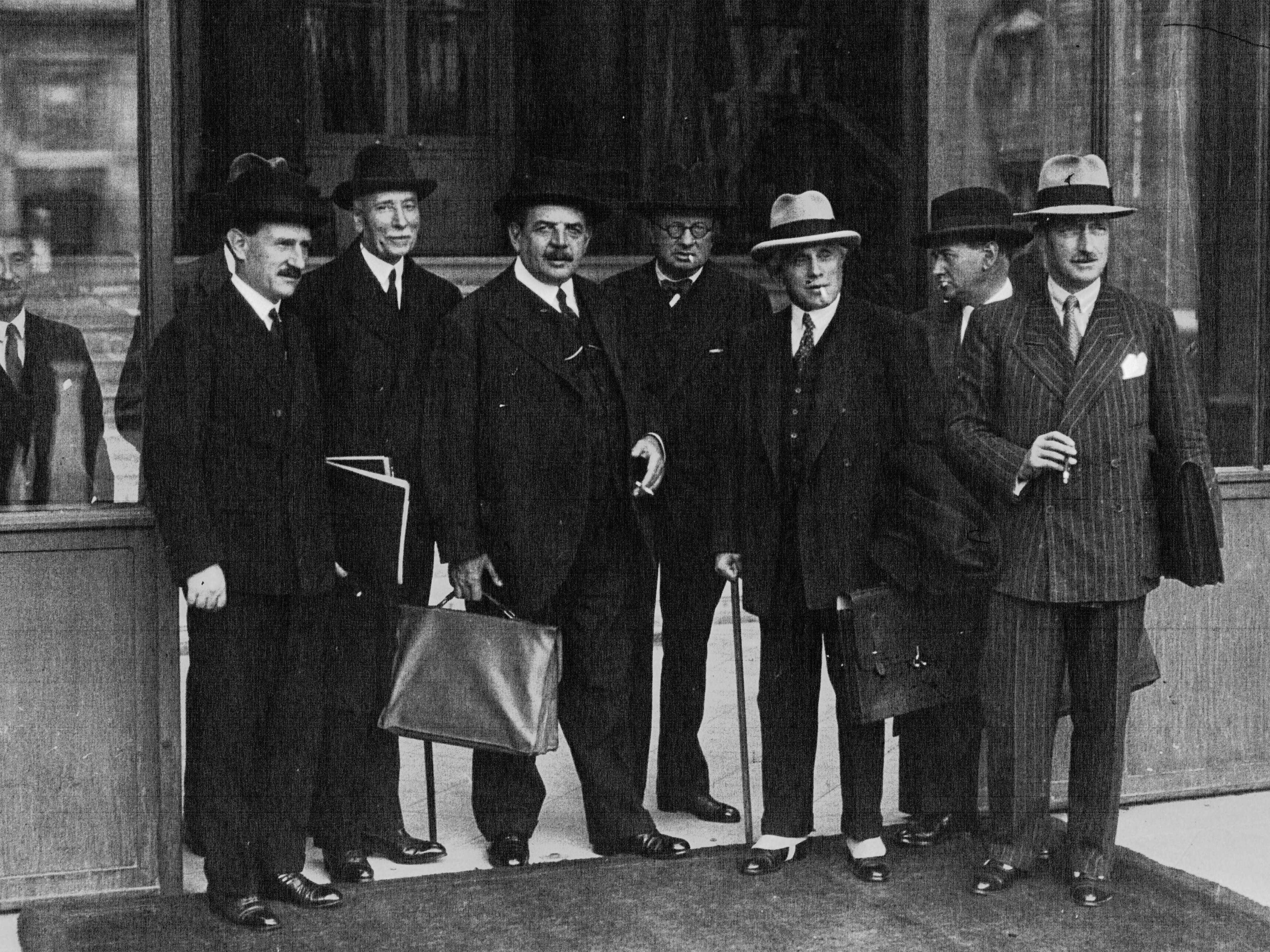 Sortie de l'Elysée : Chautemps, Renoult, Herriot, de Monzie, P. Boncour, Marchandeau et Paganon